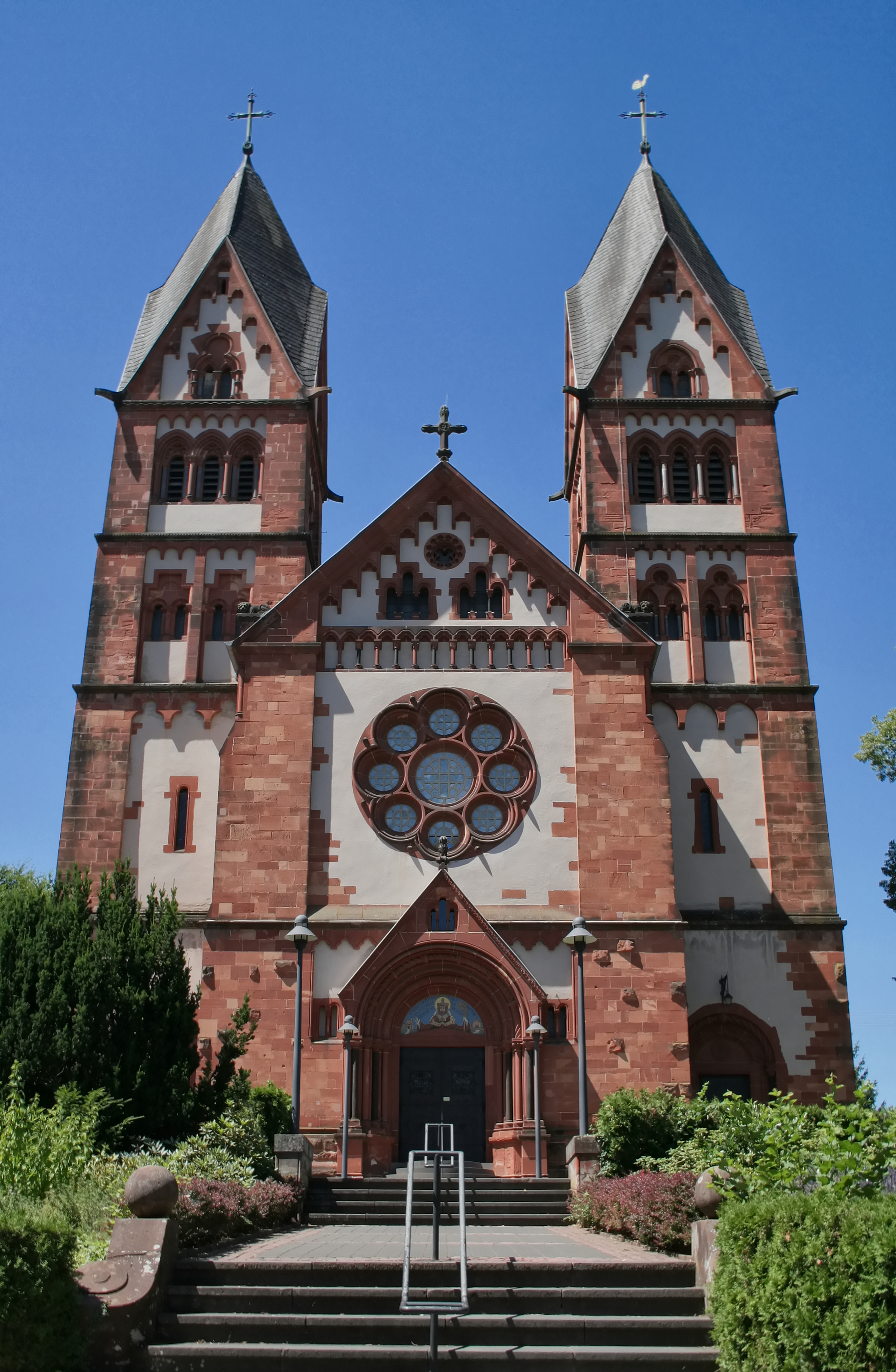 Vorderansicht der Lutwinuskirche in Mettlach